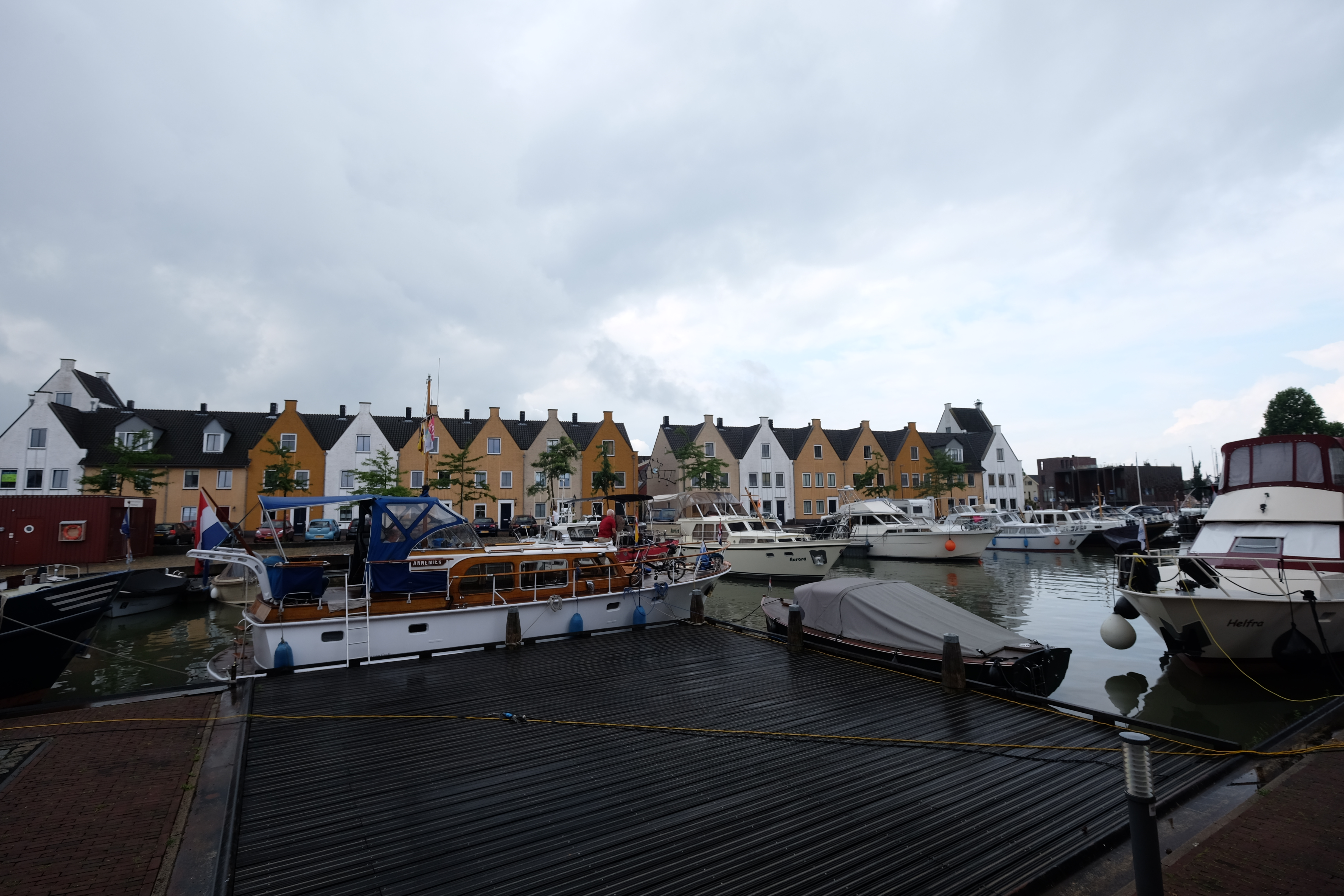 Nieuwegein, Netherlands